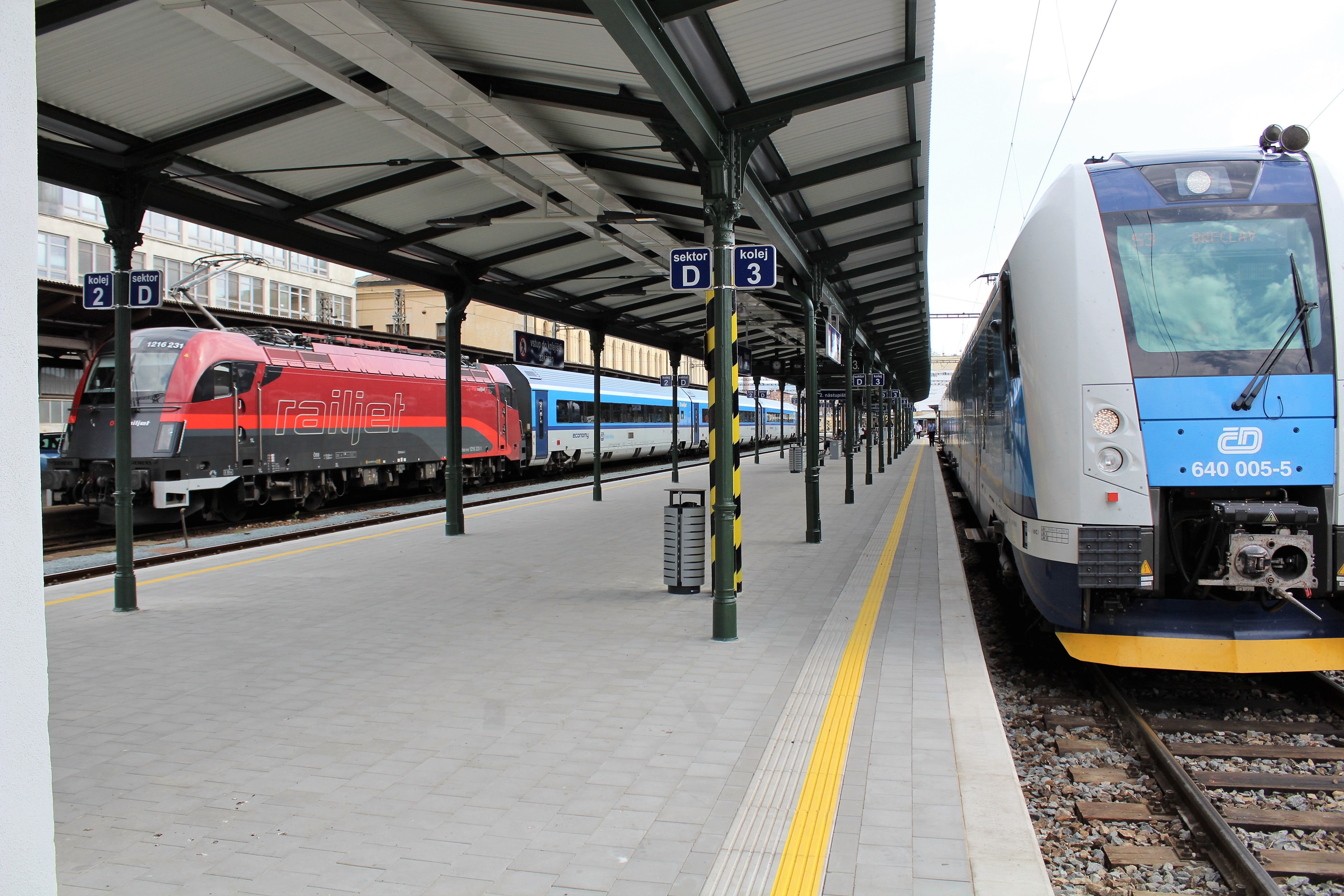 Odjíždějící RailJet Bedřich Smetana z Brna hl. n.